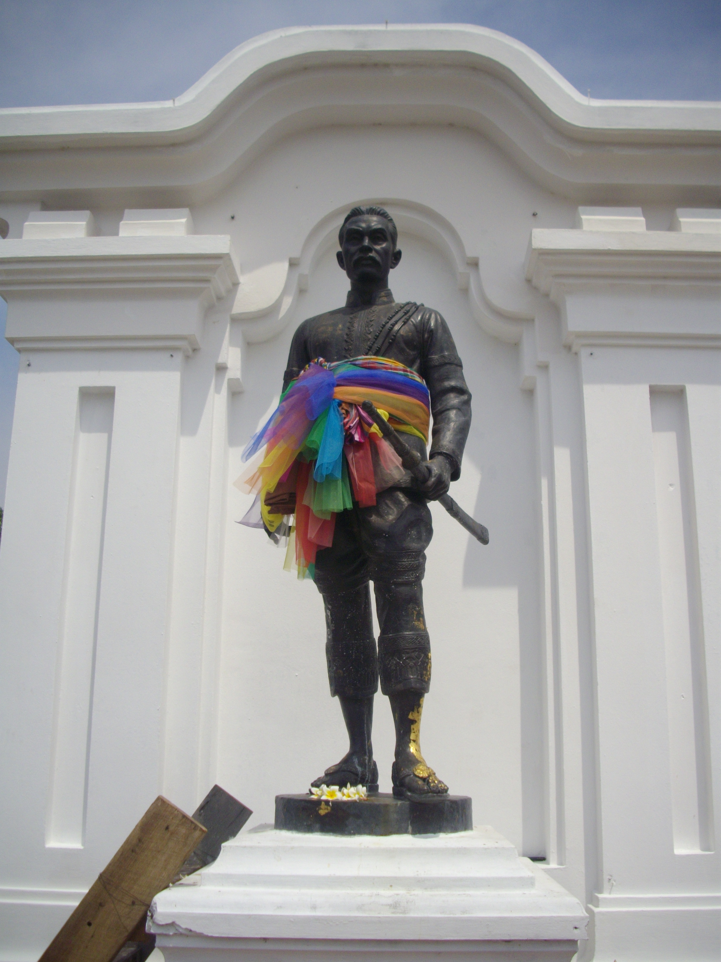 อนุสาวรีย์พระปทุมวรราชสุริยวงศ์ (เจ้าคำผง) บุตรของเจ้าพระตา ผู้สถาปนาเมืองอุบลราชธานีและเจ้าเมืองอุบลราชธานีคนแรก ต้นสกุล ณ อุบล ประดิษฐาน ณ ริมทุ่งศรีเมือง อำเภอเมืองอุบลราชธานี จังหวัดอุบลราชธานี